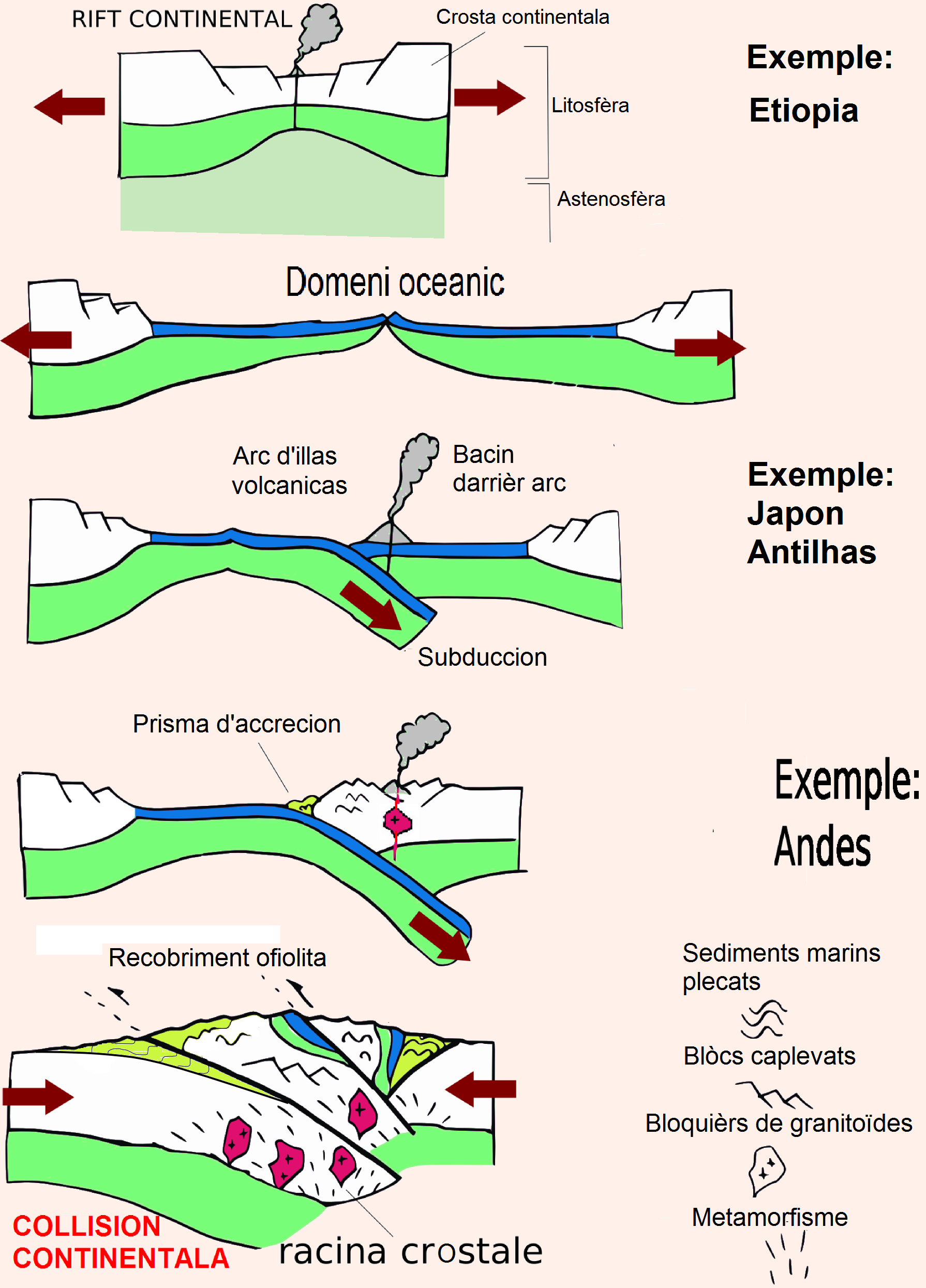 Dubertura e tancadura d'un ocean, descrich sus aquel cicle orogenic.